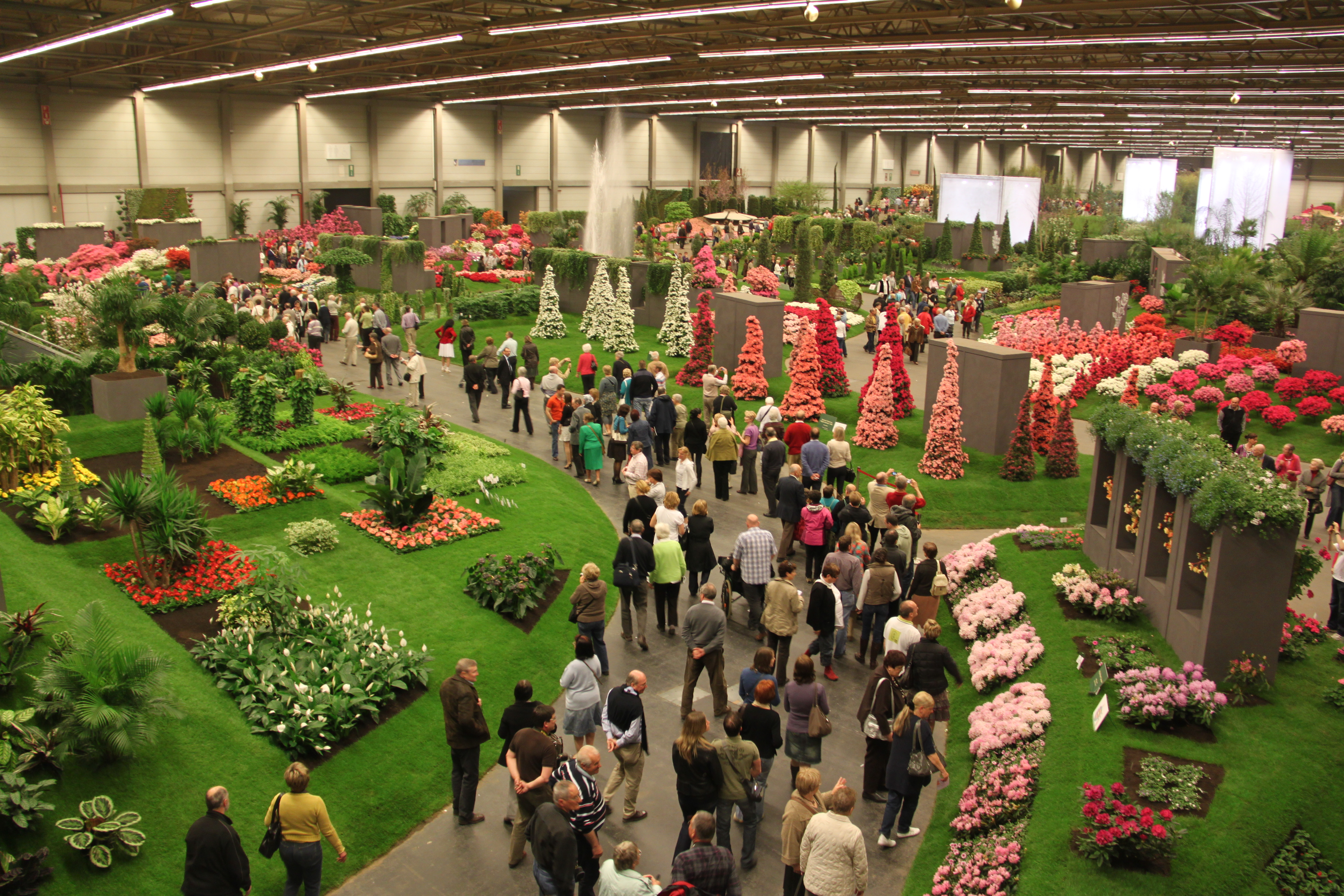 Gentse Floraliën 2010 in Flanders Expo